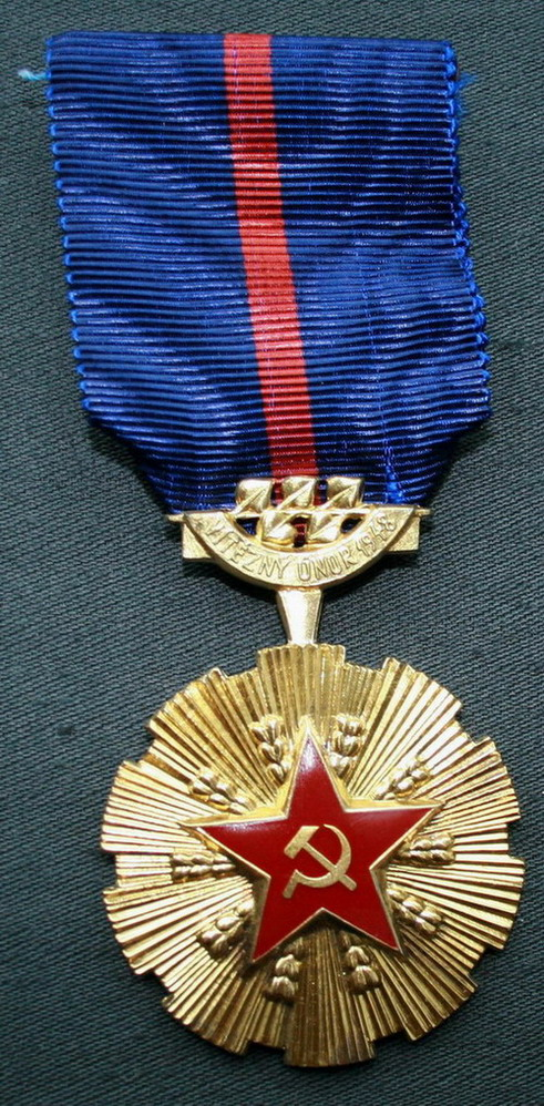 Орден Победоного Февраля (ЧССР)